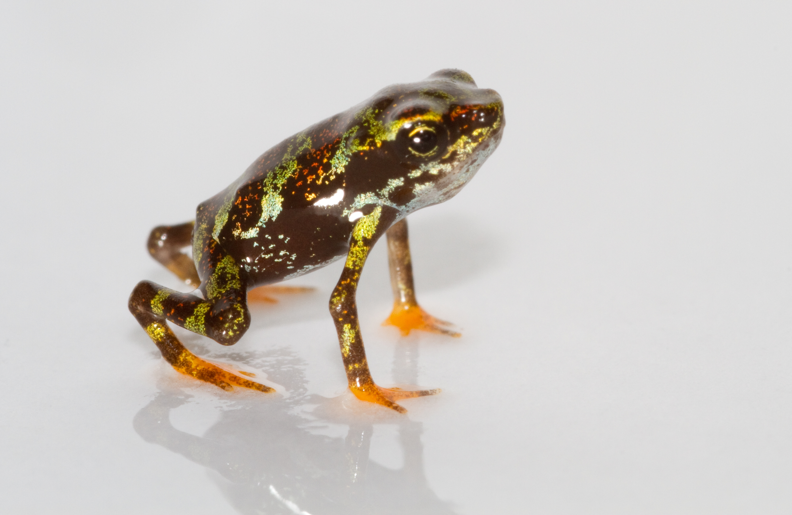 Atelopus certus, juvenile, from Panama.